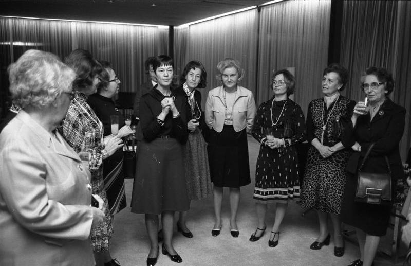 Hannelore Schmidt (Gattin von Bundeskanzler H. Schmidt) empfängt die weiblichen Abgeordneten des Deutschen Bundestages im Kanzlerbungalow.